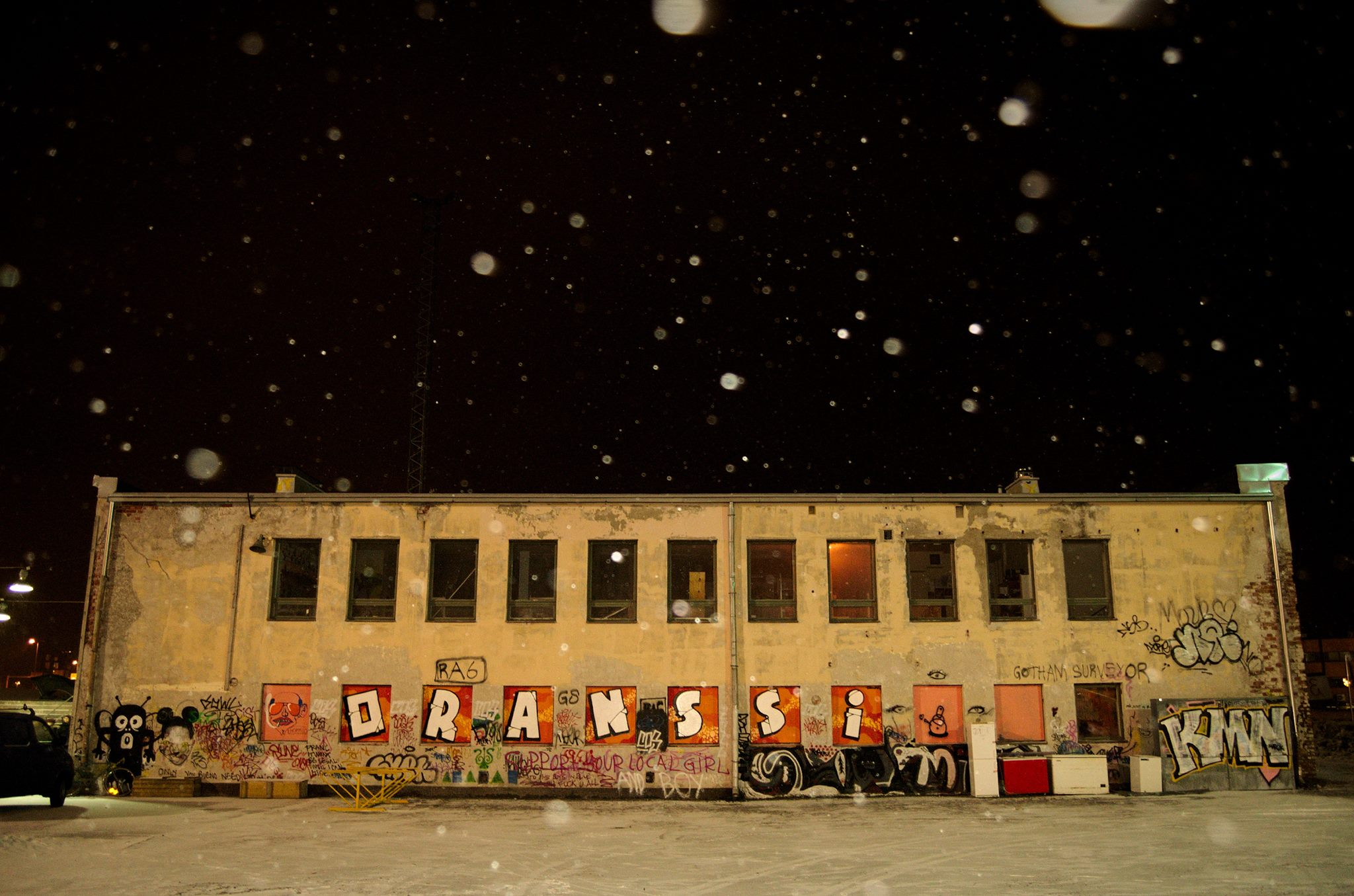 Oranssi Valvomo Suvilahdessa 2015